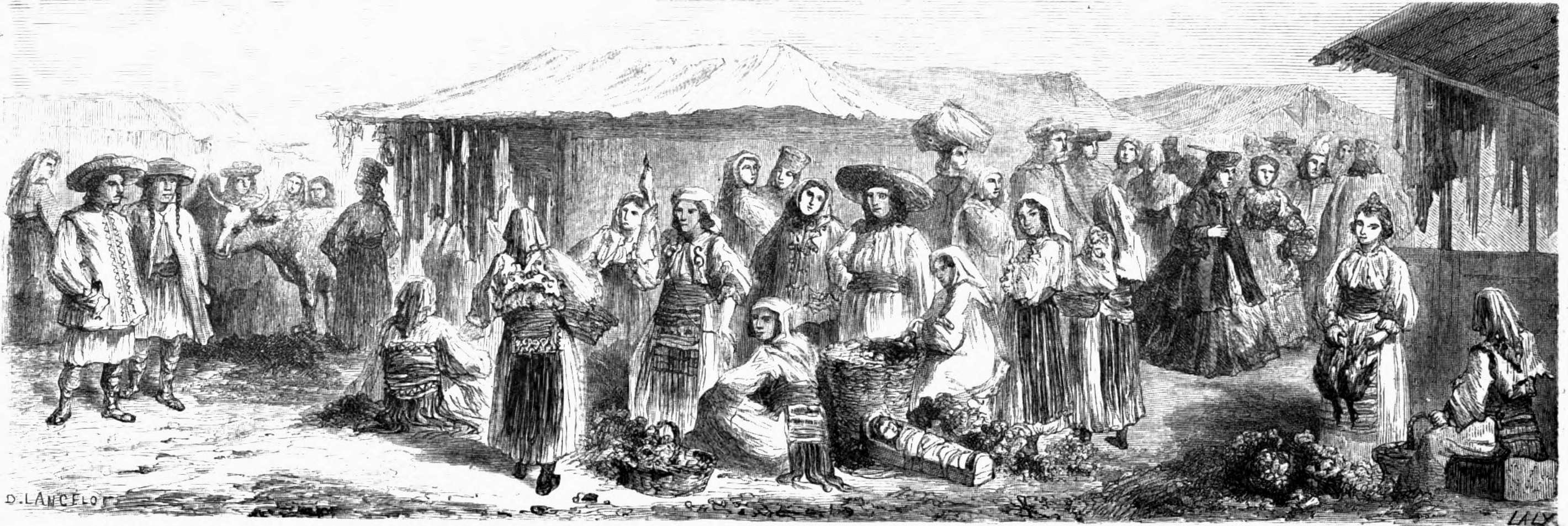 Roumains de Temesvar